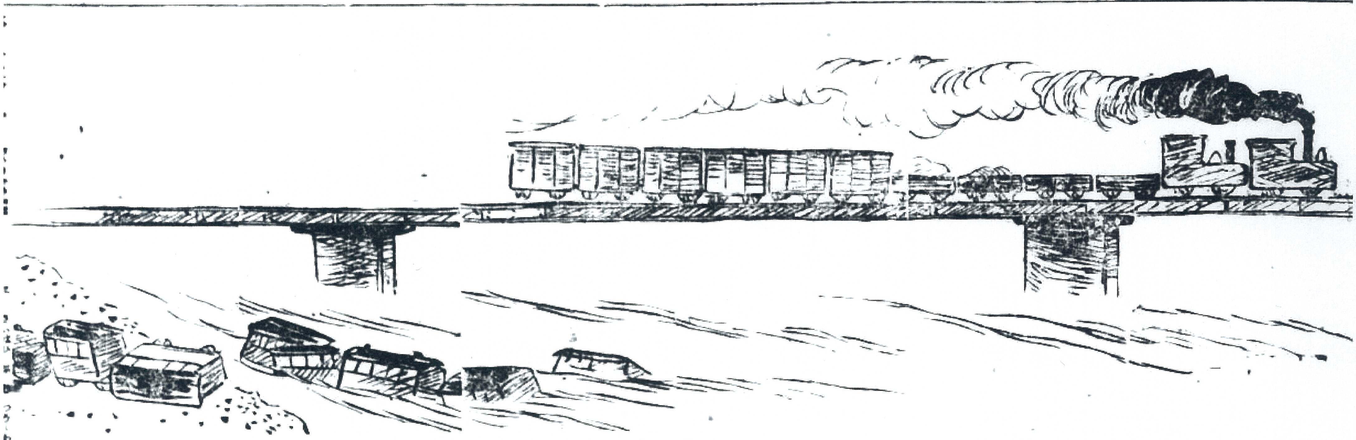 箒川鉄橋列車転落事故のイラスト 東京朝日新聞 明治32年10月9日